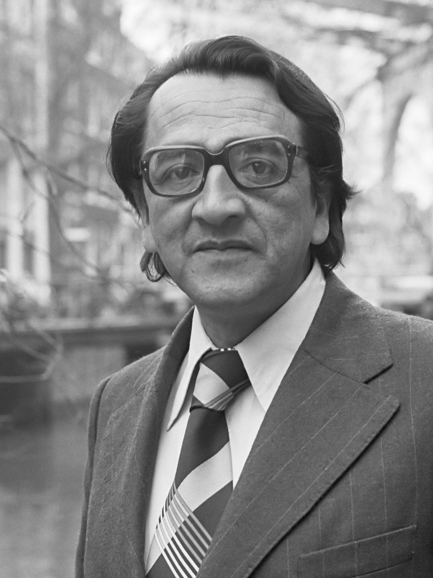 Alfonso Barrantes Lingán. Peruviaanse politicus 30 maart 1979